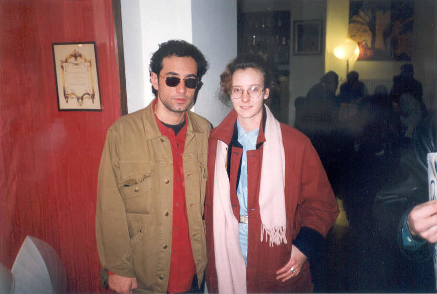 archivio personale di Cinzia Donati